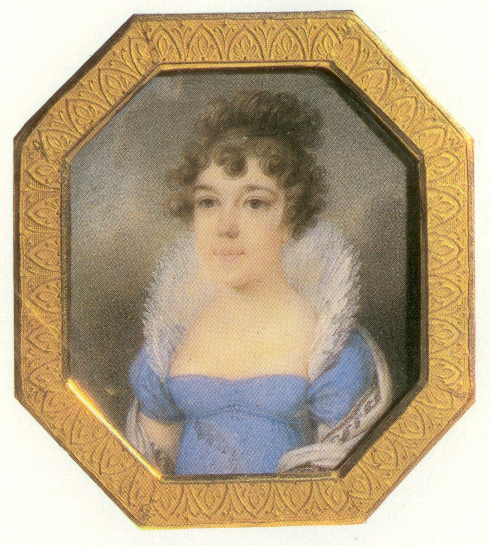 Графиня Мария Александровна Апраксина, ур. Шемякина (1794-1872), жена А. И. Апраксина